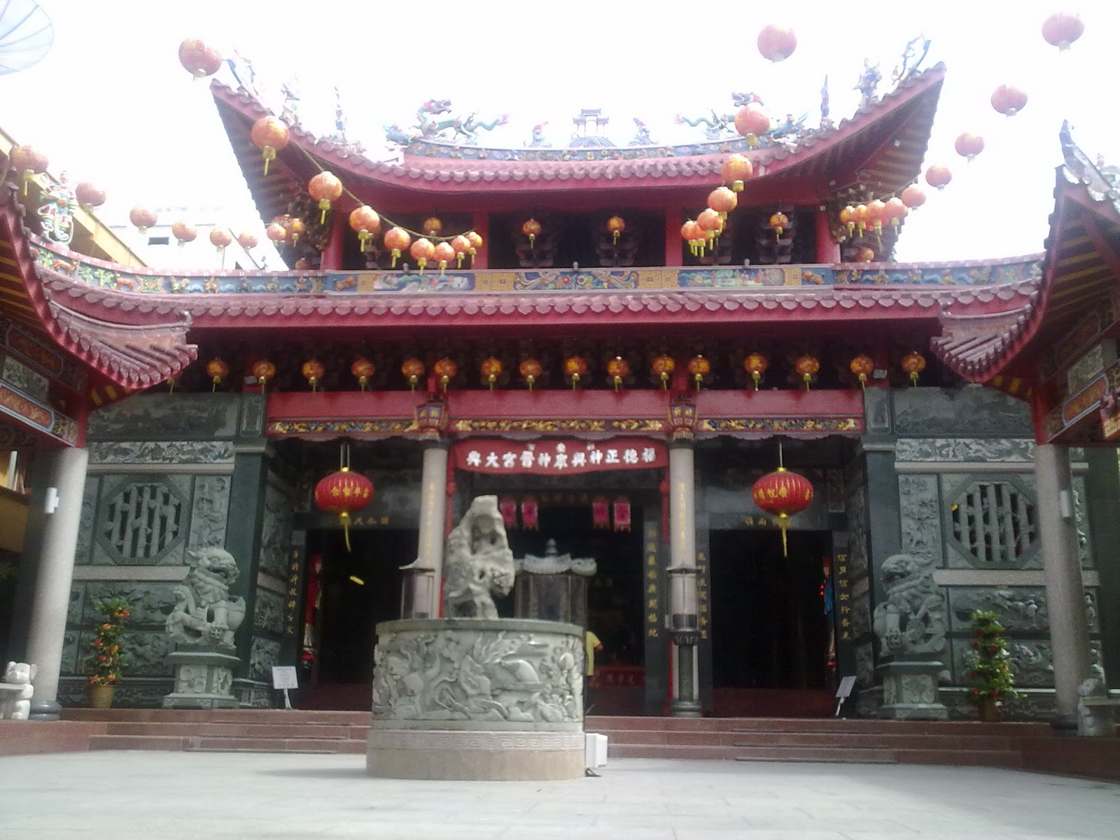 pribadi